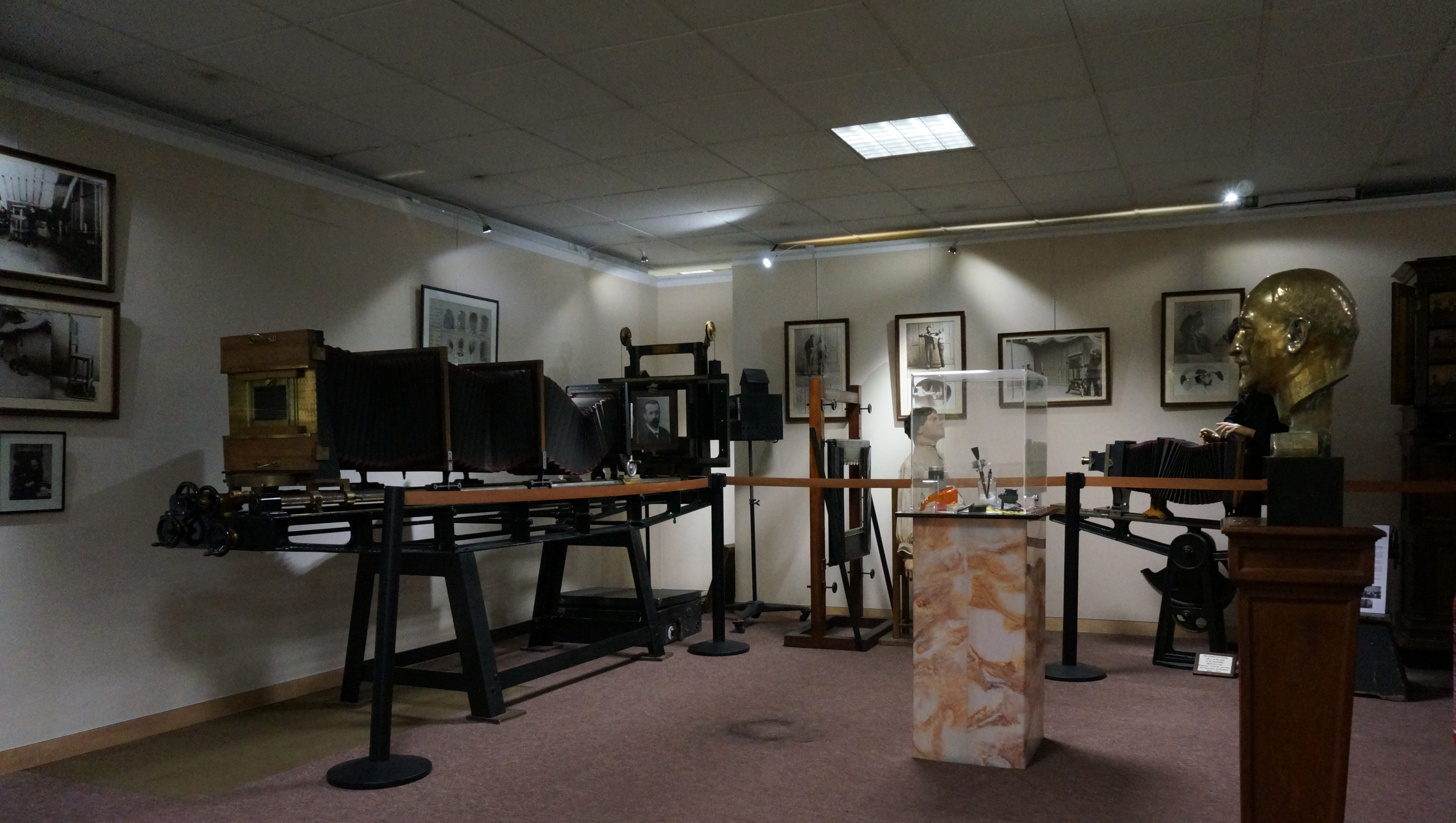 présenté au Musée de la Préfecture de Police (Paris).